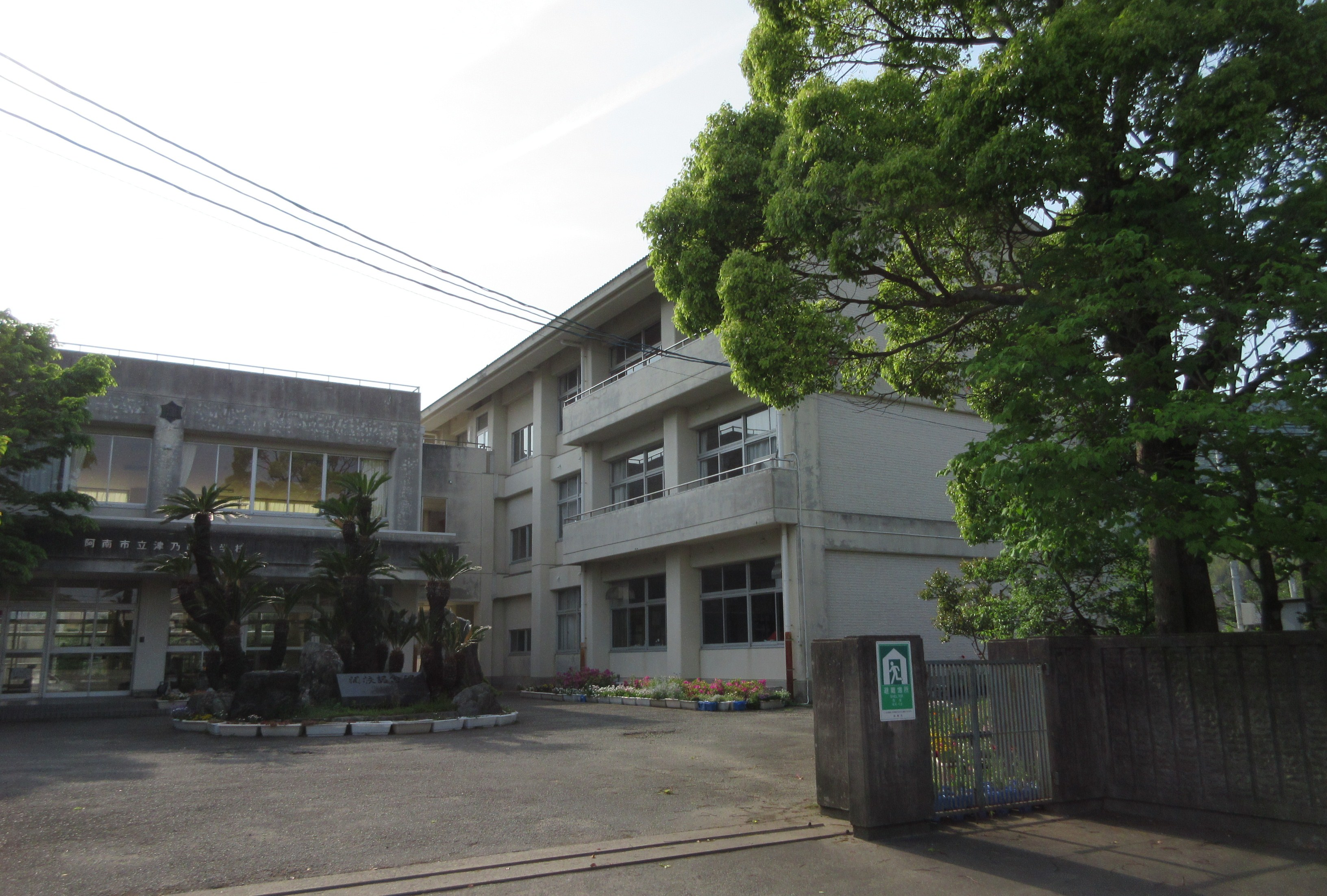 阿南市立津乃峰小学校